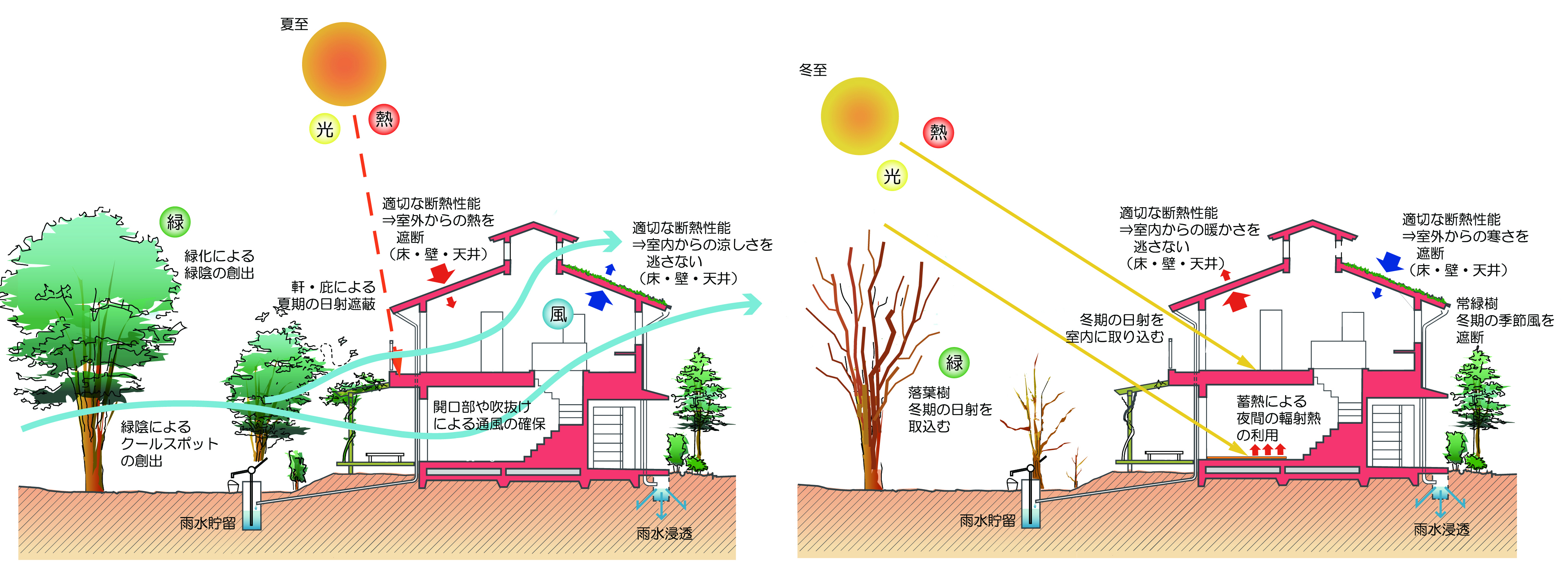 軒・庇による夏と冬の太陽熱・日射の調整。落葉樹による夏と冬の太陽熱・日射の調整。樹木によるクールスポットの創出と通風促進による冷気導入。適切な断熱性能の確保による外壁や屋根等からの熱の出入りの削減。